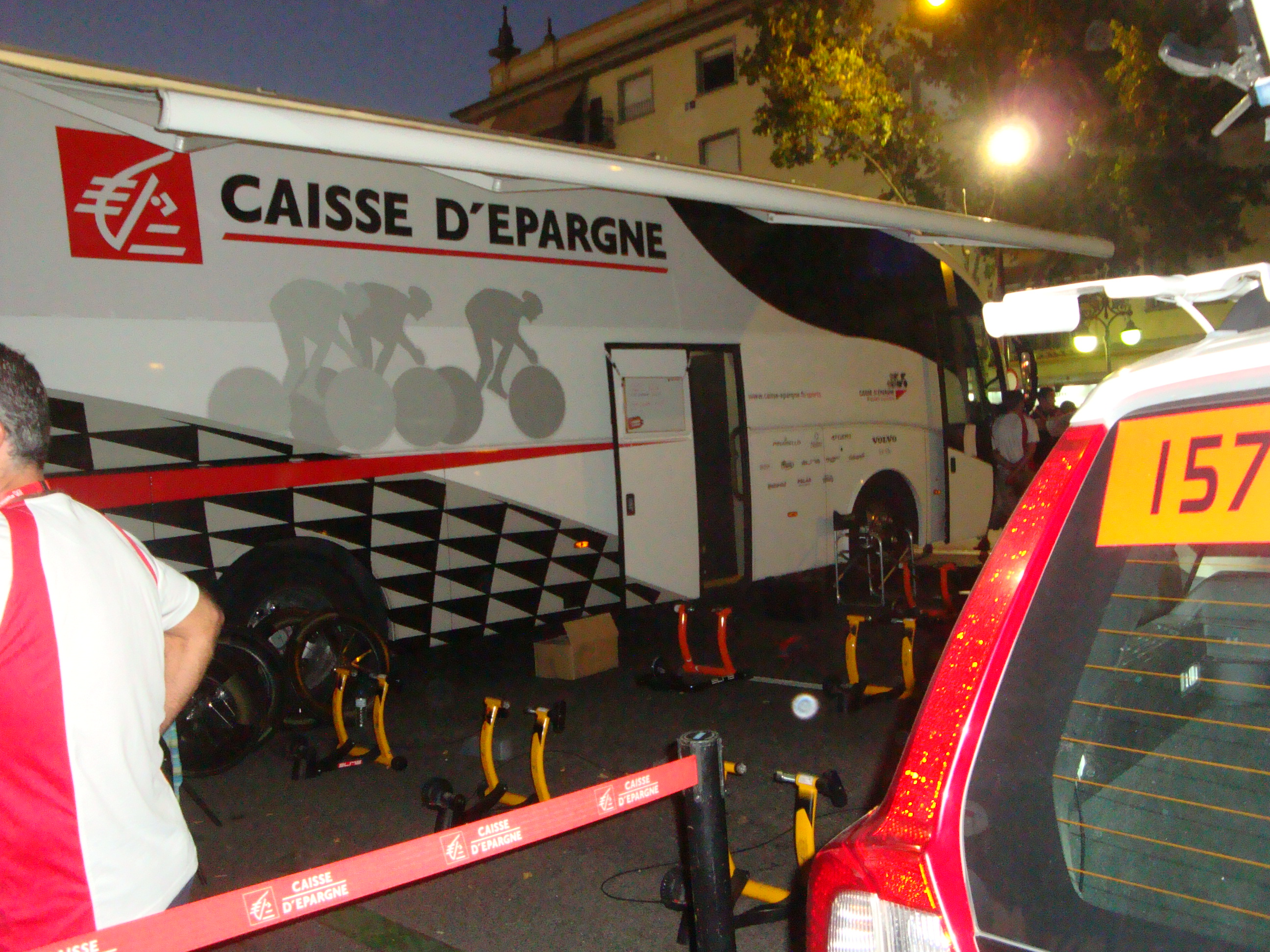 Autobús del equipo ciclista Caisse d´Epargne en la Vuelta a España 2010